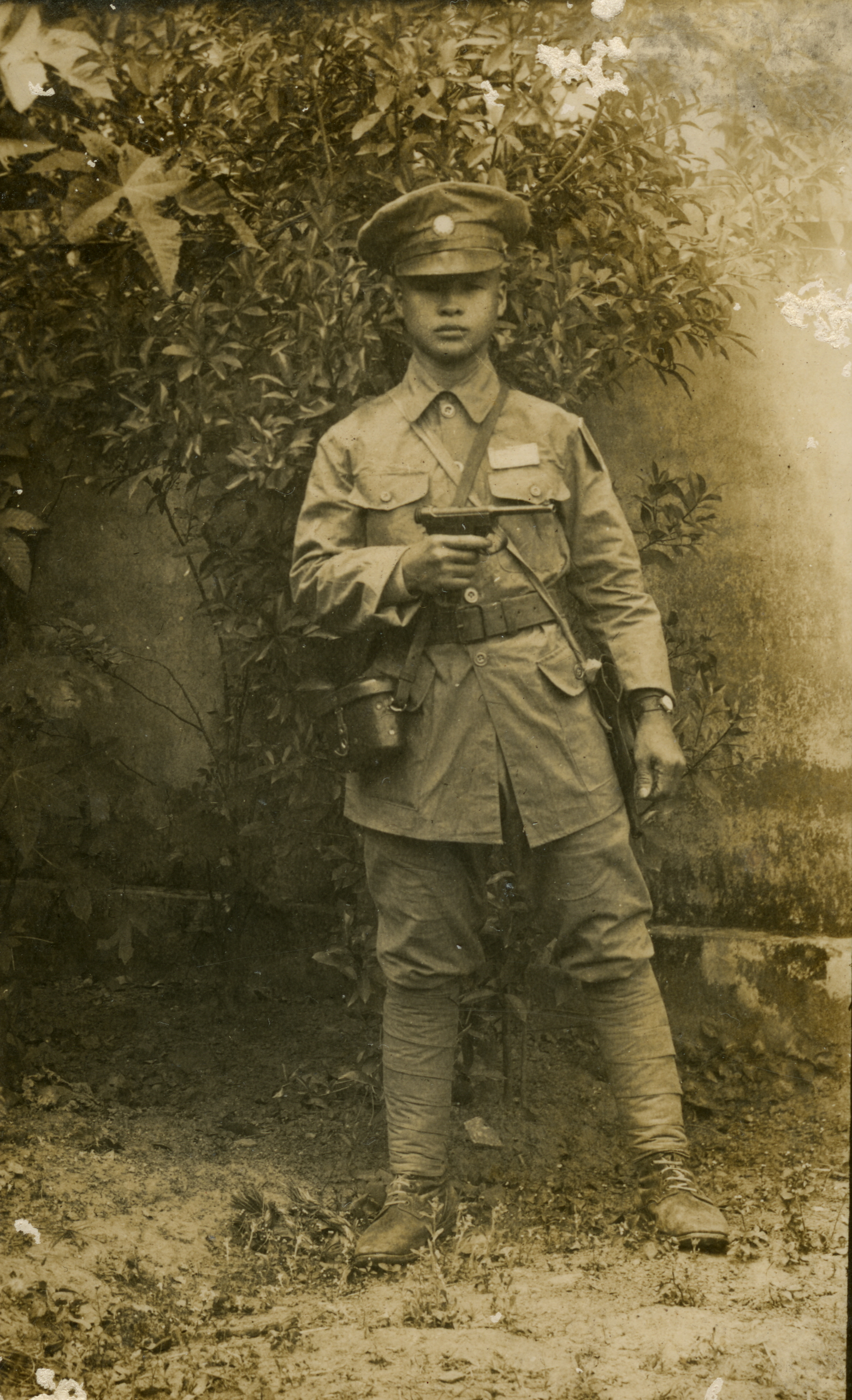 一位國民革命軍軍人。